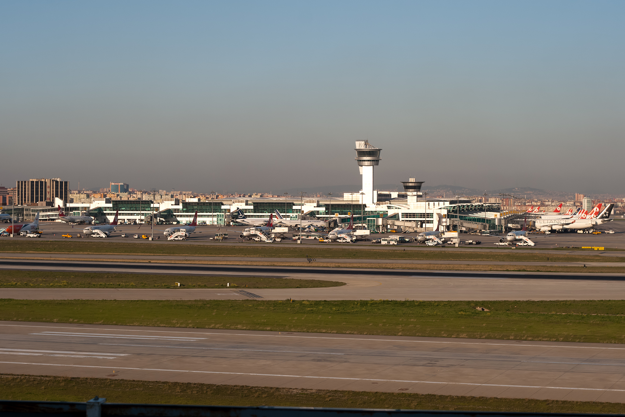 LTBA/IST Busy Ramp.